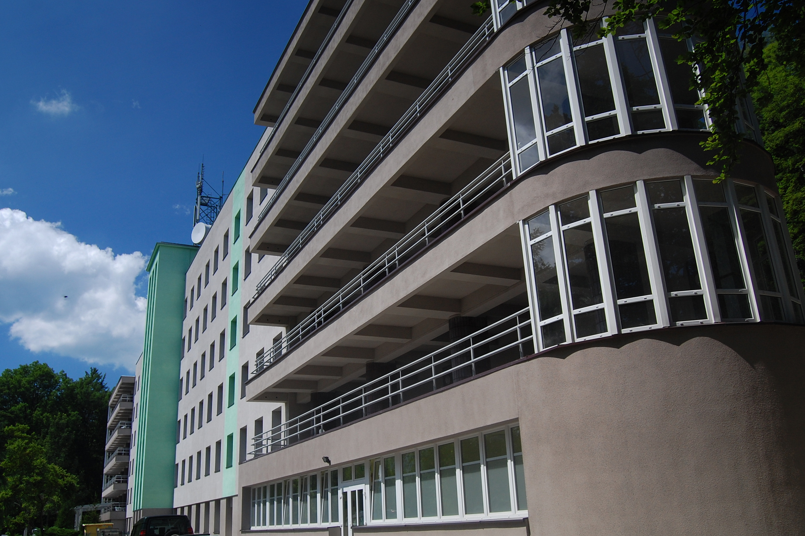 Specjalistyczny Zespół Chorób Płuc i Gruźlicy w Bystrej (Bystra, powiat bielski) (jeden z budynków kompleksu)